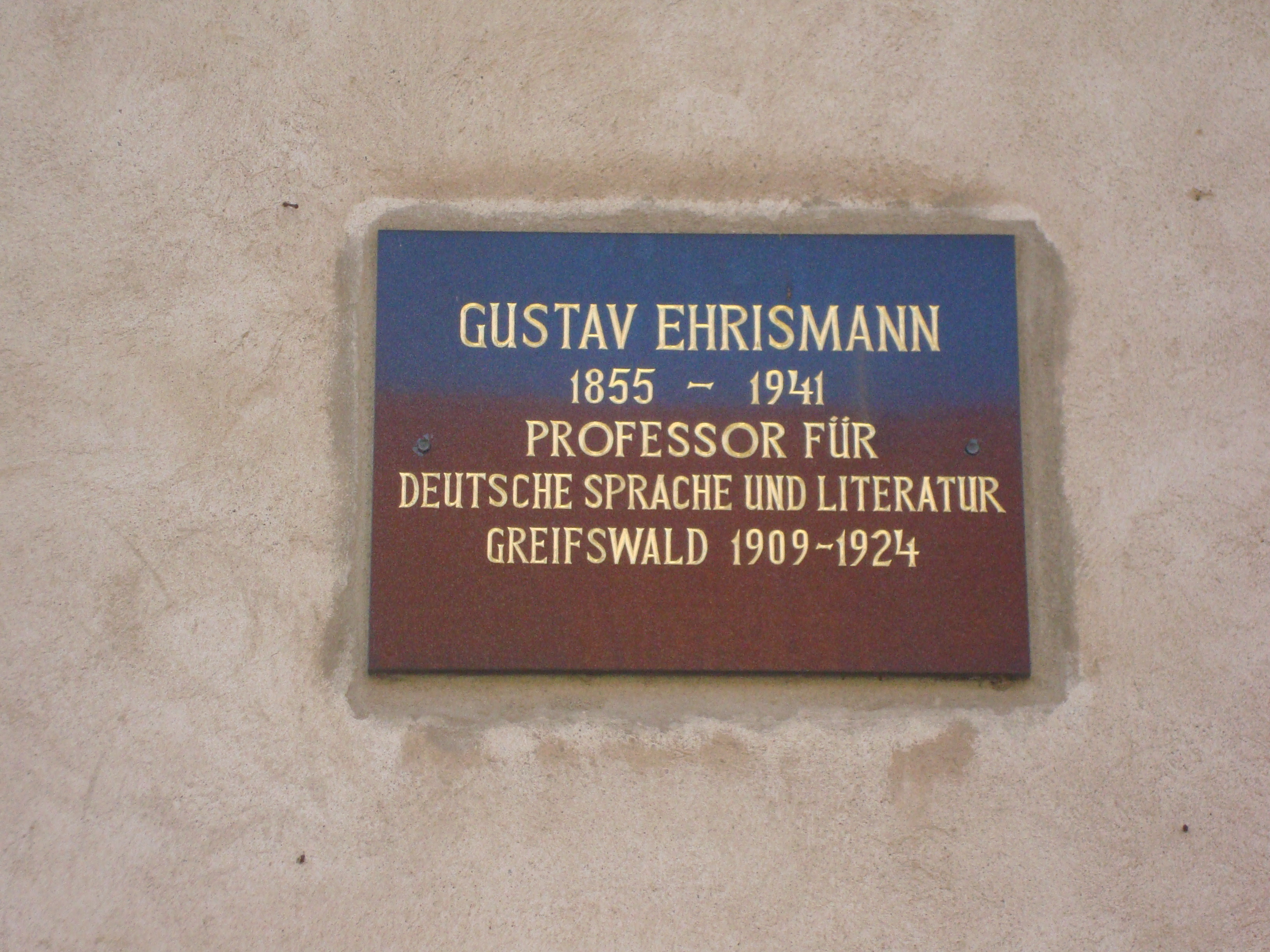 Gedenktafel für Gustav Ehrismann in der Domstraße 9a in Greifswald.